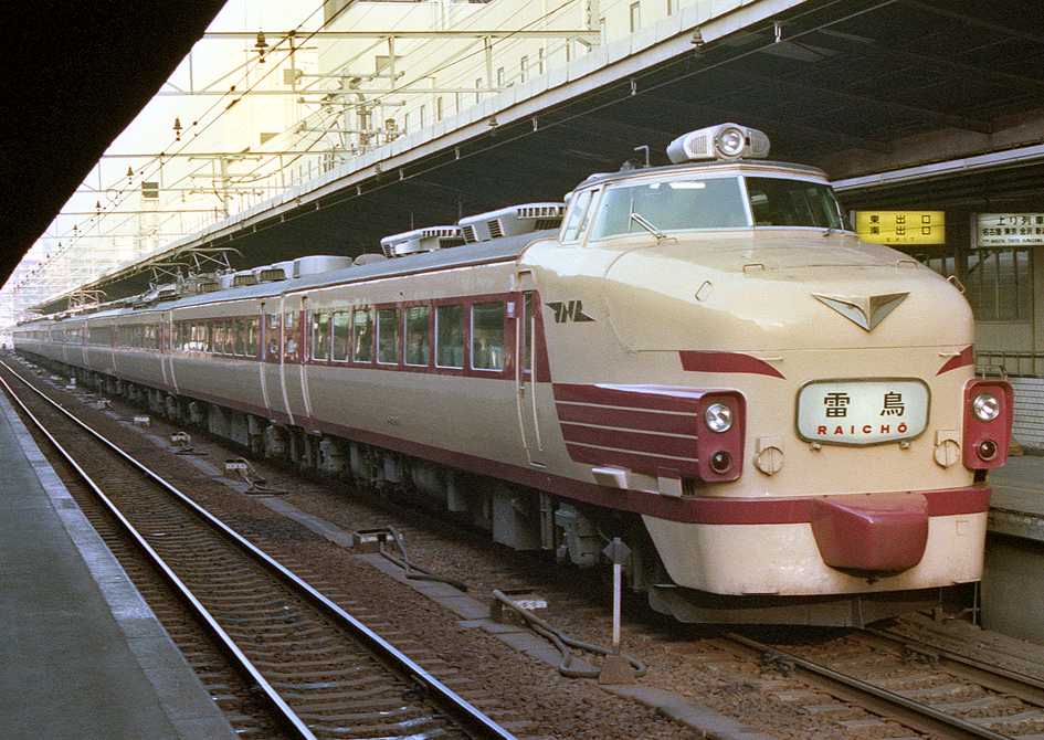 国鉄 485系特急形電車 特急「雷鳥」 クハ481-100番台